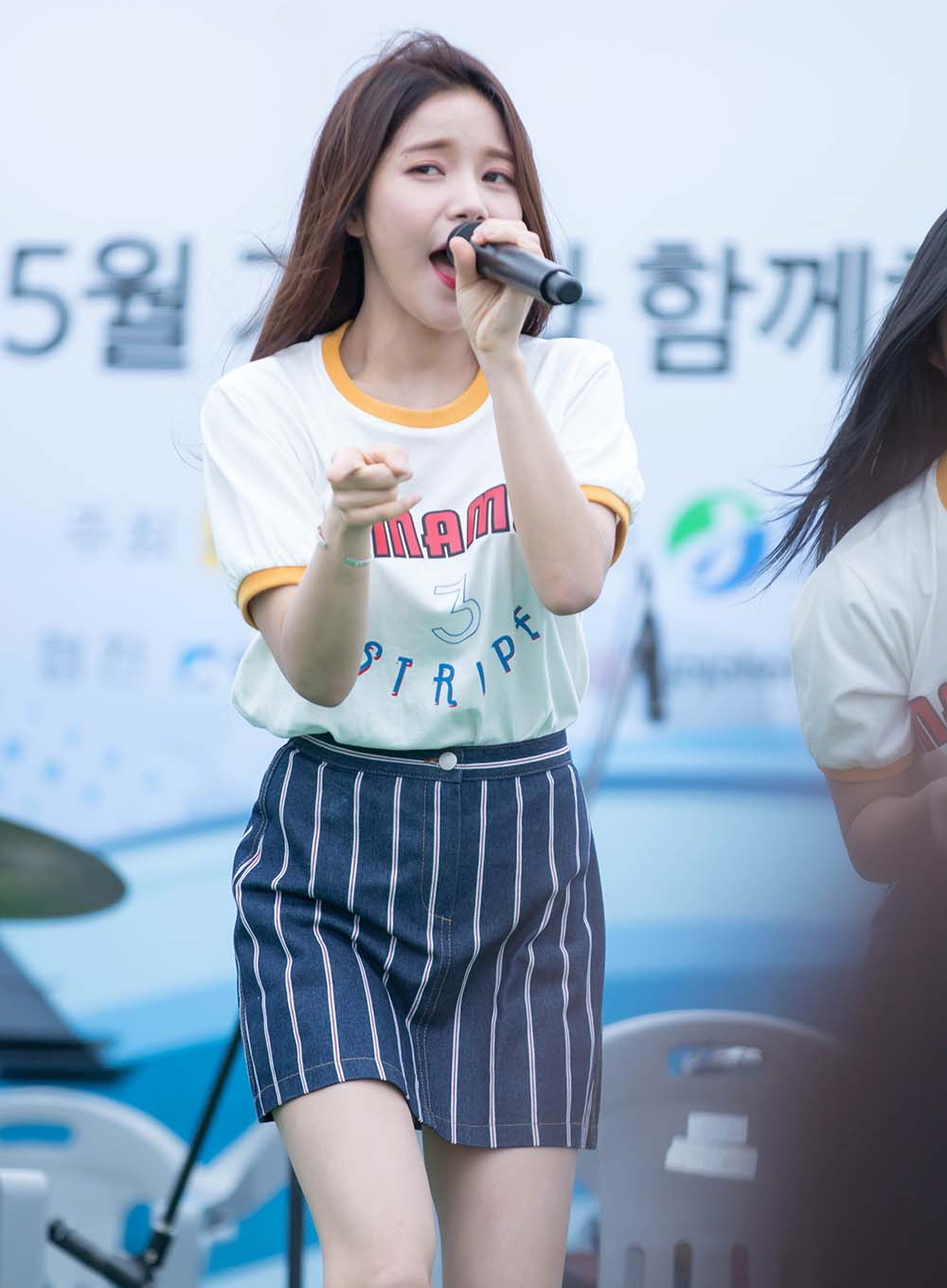 160505 영암 모터&레저 스포츠 한마당 - 솔라11pic.By.Holic